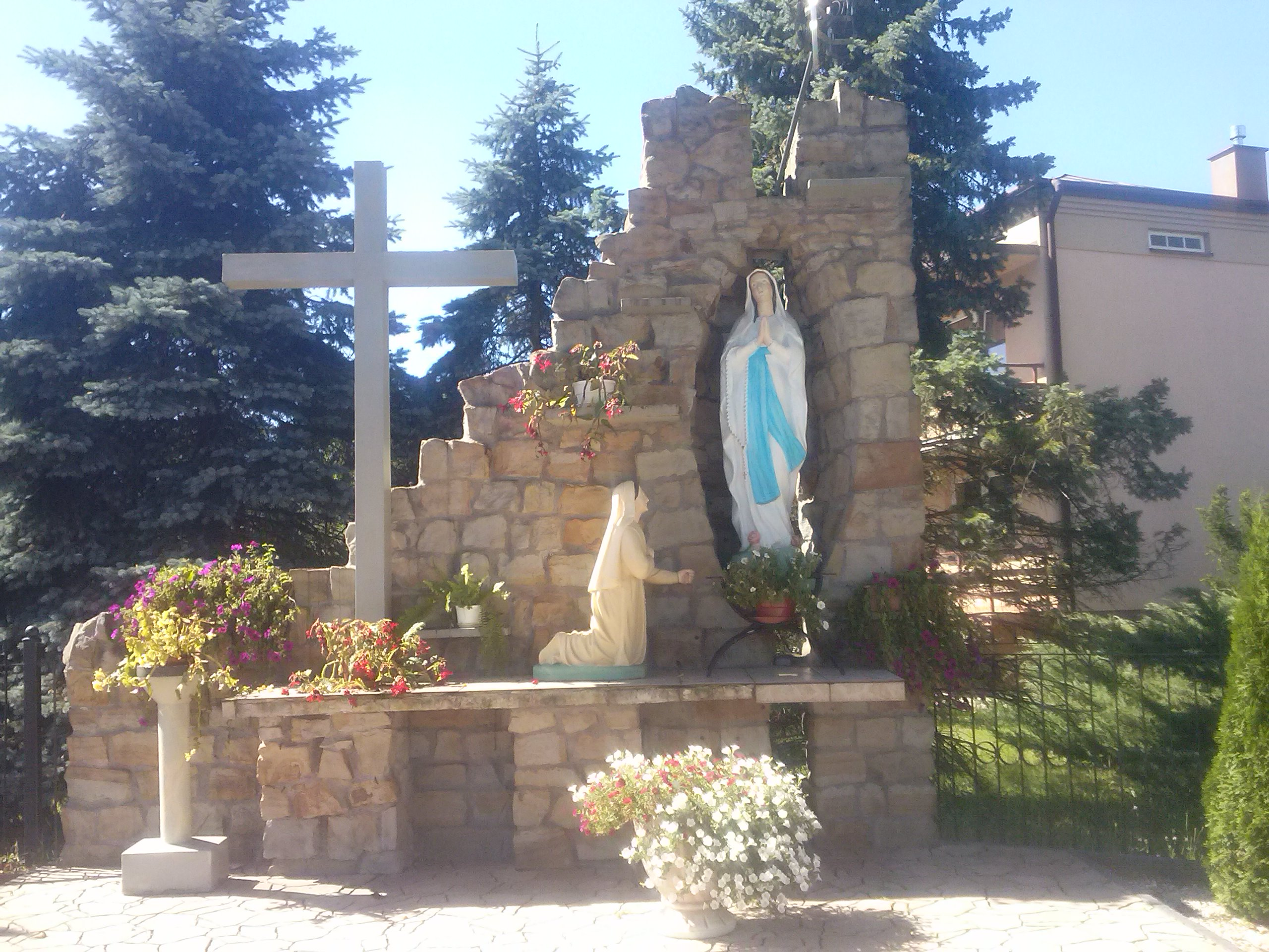 Grota Matki Bożej z Lourdes, przy kościele pw. św. Stanisława Biskupa w Wólce Pełkińskiwej (po prawej stronie była dawniej plebania z frontowym napisem "Cześć Maryi")